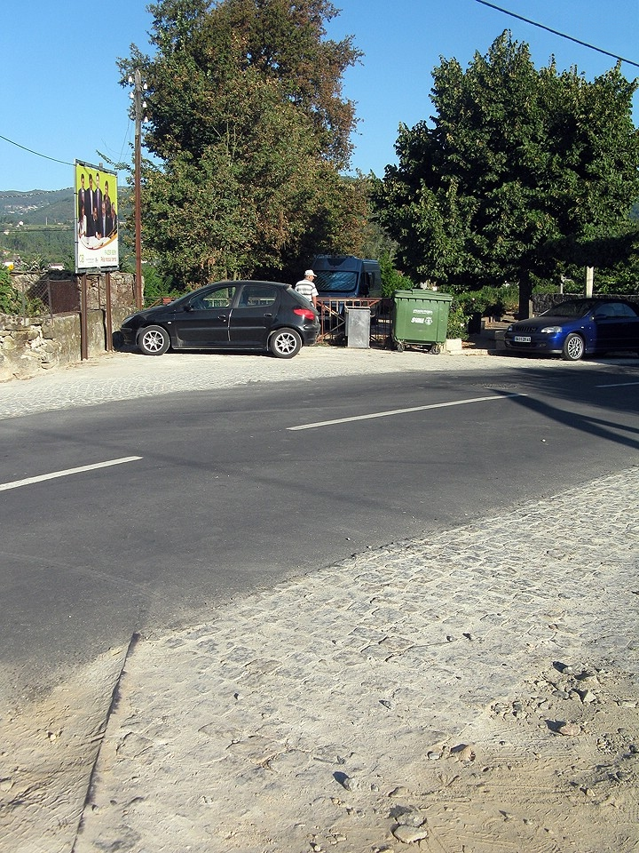 Por mais estranho que pareça, os carris nesta estrada não foram retirados mas sim enterrados por alcatrão (notem um dos carris a "enterrar-se" na estrada)